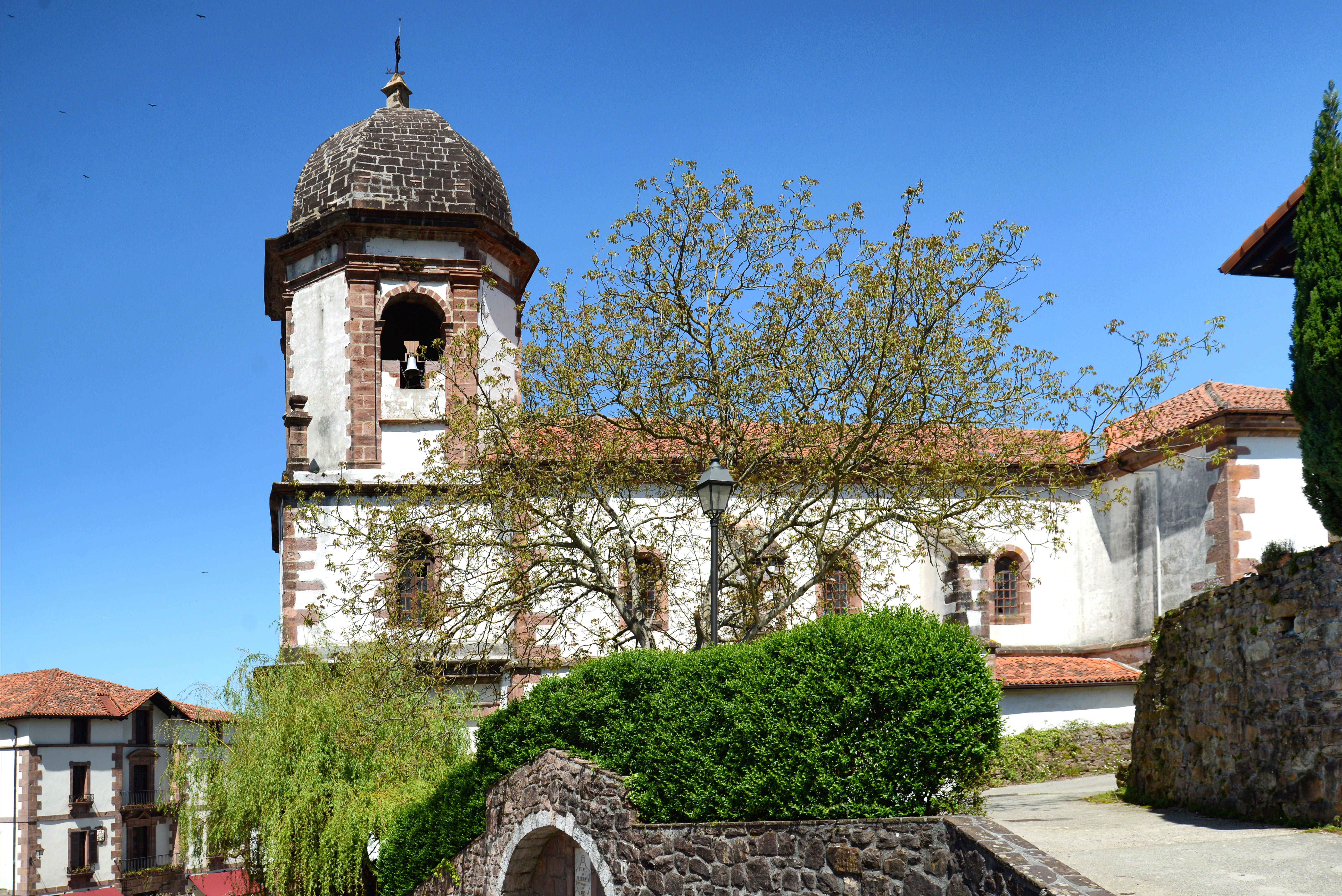 Zugarramurdi, Pays basque espagnol (Navarre) - Église de l'Assomption du XVIIIe siècle.